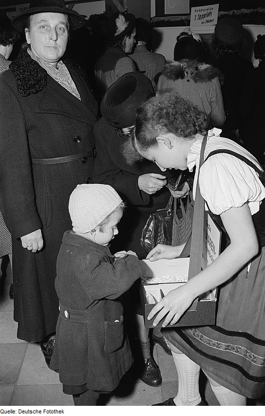 Original image description from the Deutsche Fotothek Kleines Mädchen ein Los ziehend